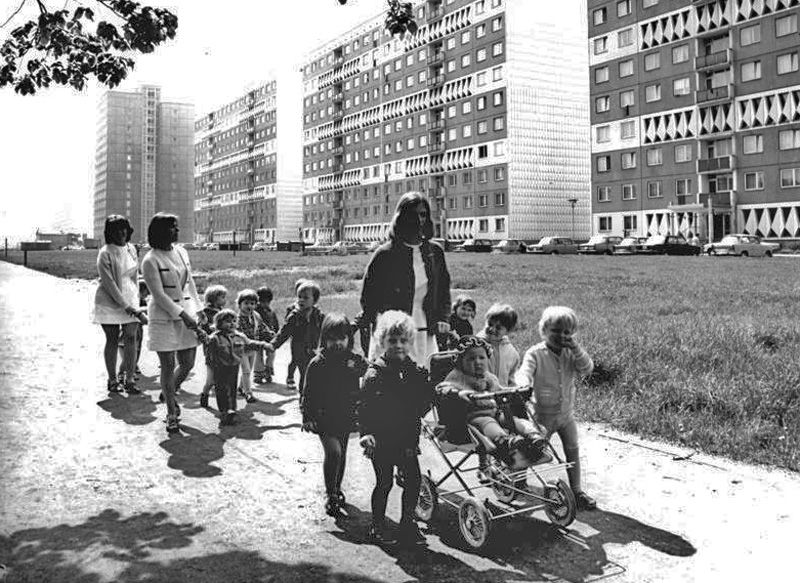 Leipzig, Straße des 18. Oktober, Wohnblocks ADN-ZB Dang dinh An-22.5.75 Leipzig: Ihren täglichen Spaziergang unternehmen diese kleinen Leipziger durch das neue Wohngebiet an der Straße des 18. Oktober